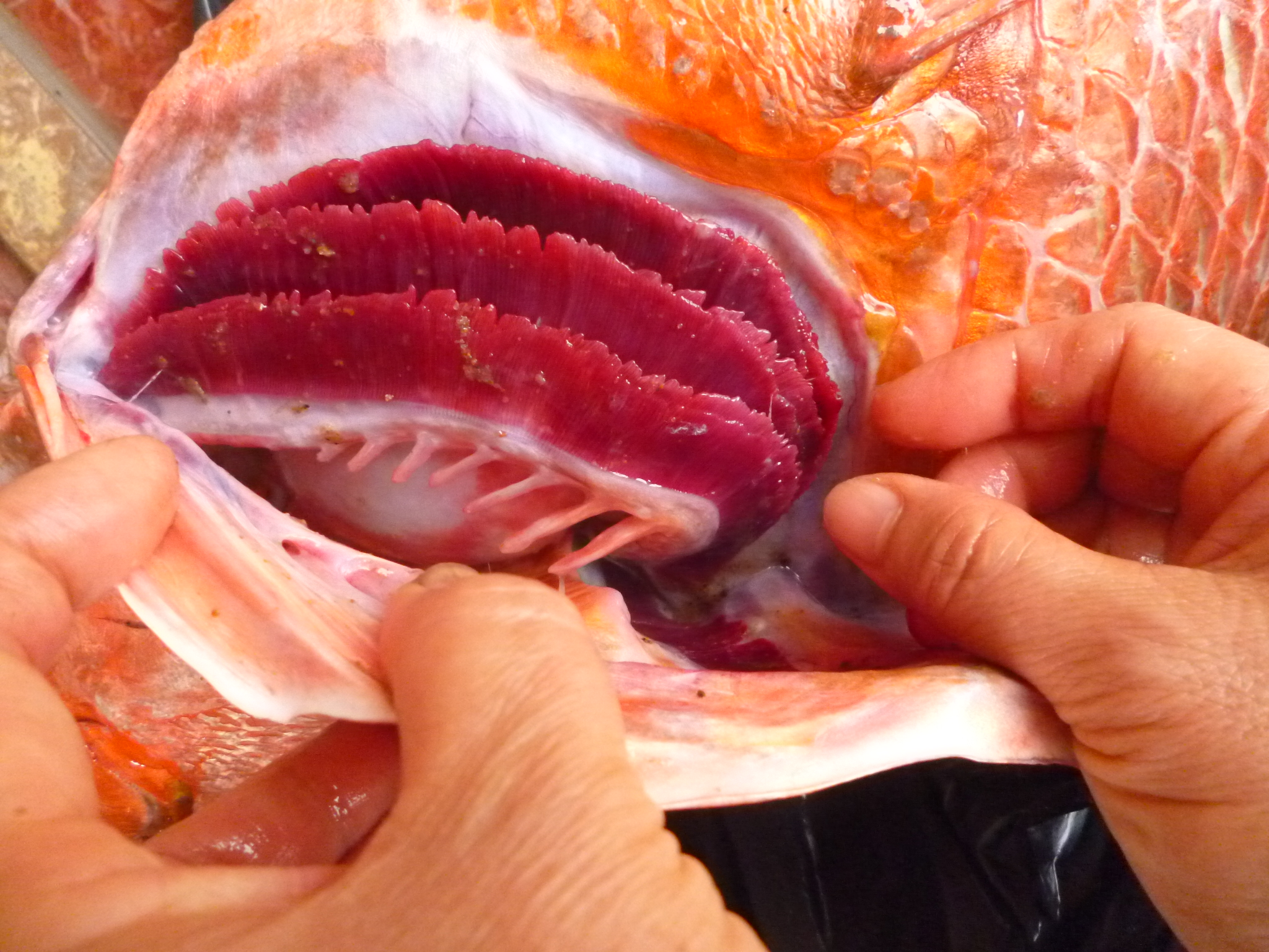 Cá hồng đỏ ở Đông Hà (mang cá còn đỏ tươi)